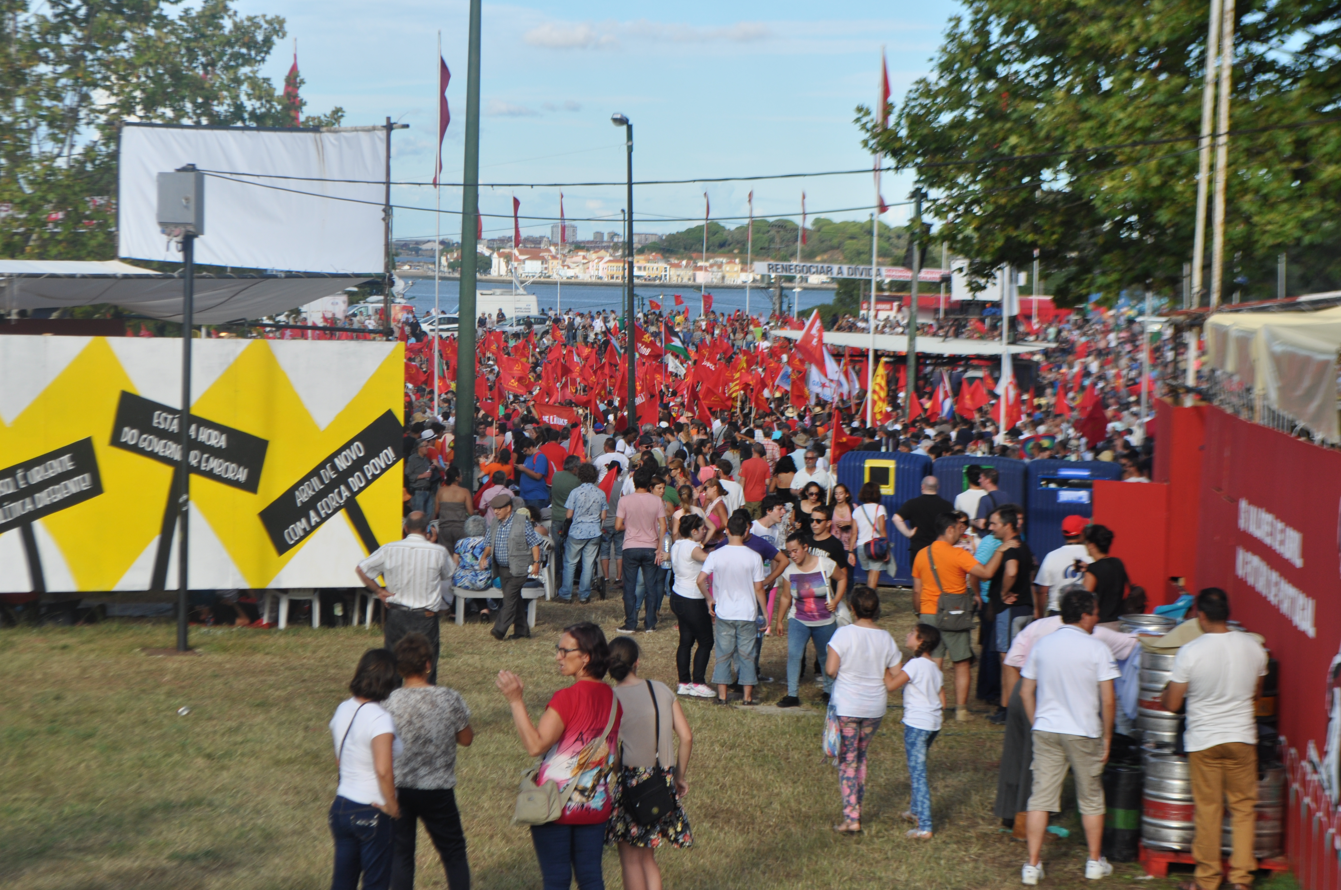 Festa do Avante!, festa do jornal Avante!, órgão oficial do Partido Comunista Português. Edição 2014 da Festa do Avante! quarenta anos depois da Revolução de Abril de 1974 (Revolução dos Cravos). Comício da Celebração Domingo, 7 de Setembro